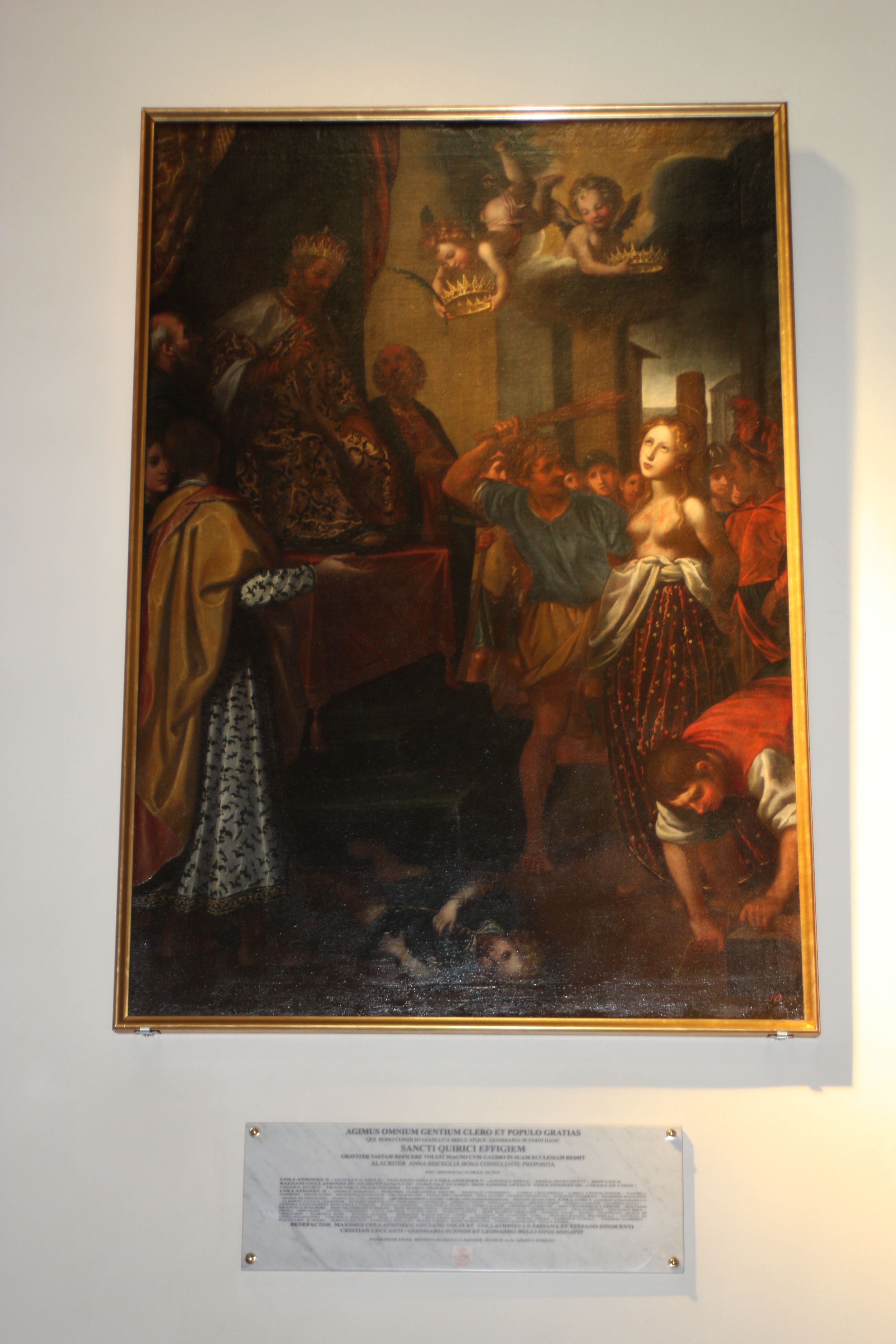 Immagine del Martirio di San Quirico della Chiesa di San Quirico a Legnaia; in basso San Quirico Martire, a destra la madre Santa Giulitta, a sinistra il governatore Alessandro